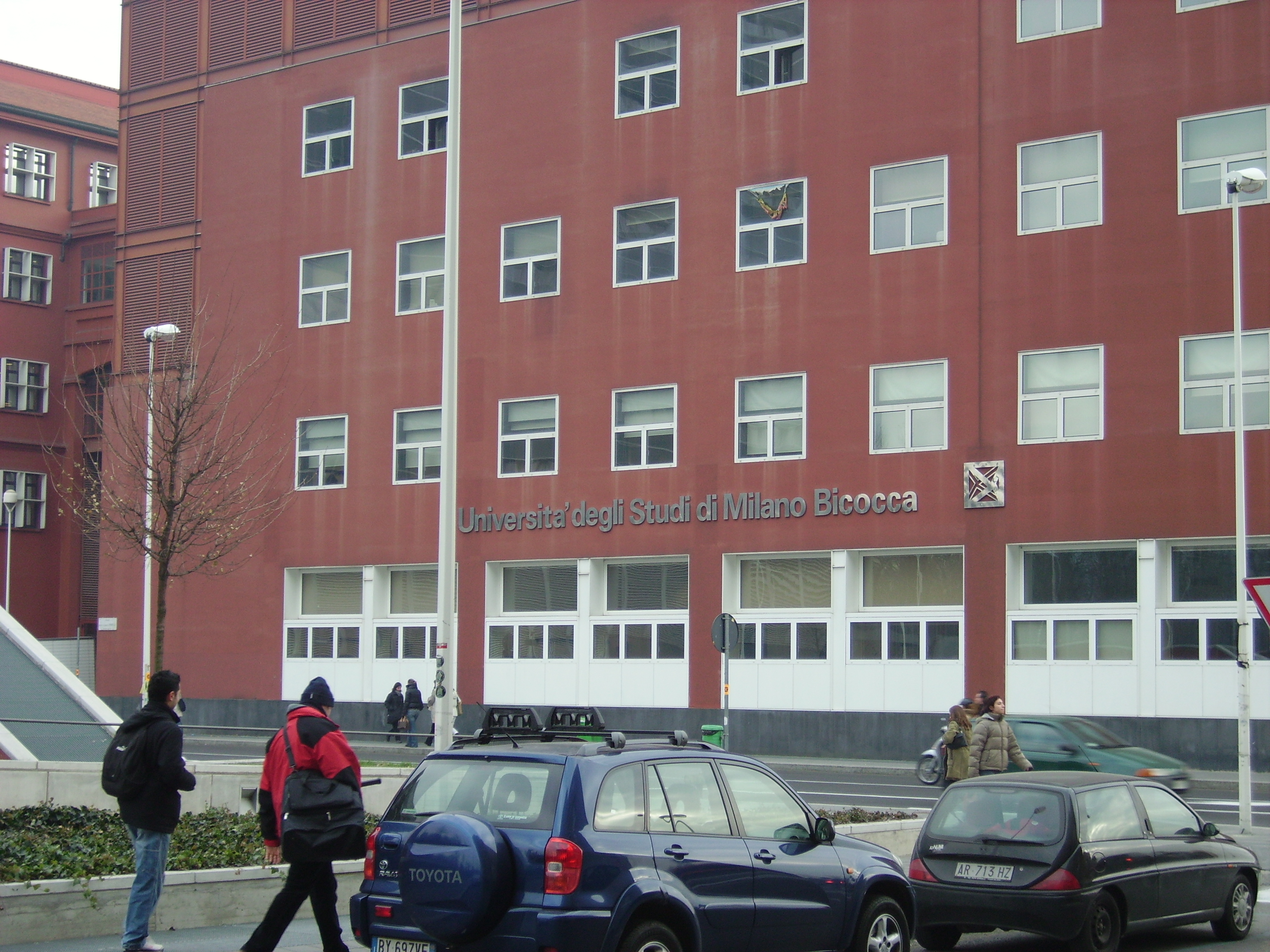 Foto scattata da me nel dicembre del 2005